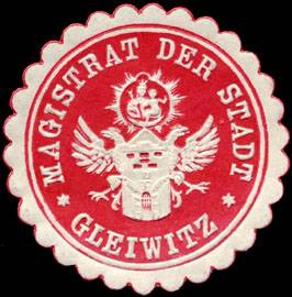 Sealing stamp Title: Magistrat der Stadt - Gleiwitz Description: rot, weiß, geprägt Place: Gleiwitz size: 3 cm